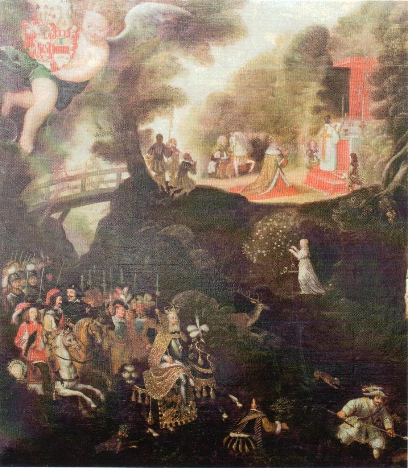 Hildesheim, Dommuseum, Darstellung der Gründungslegende